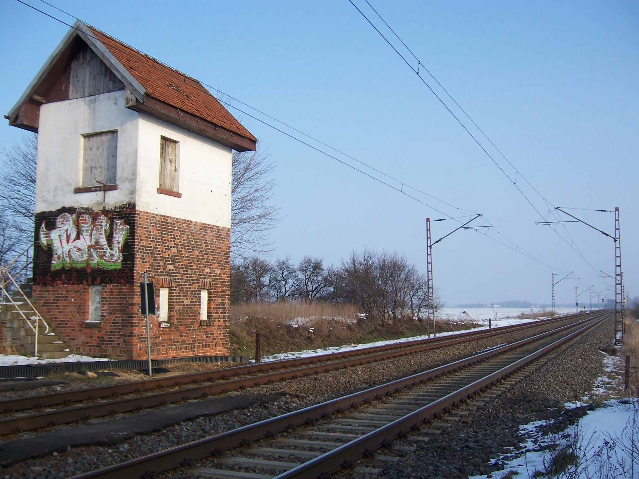 ehemalige Blockstelle Trebnitz, Bahnstrecke Trebnitz–Leipzig